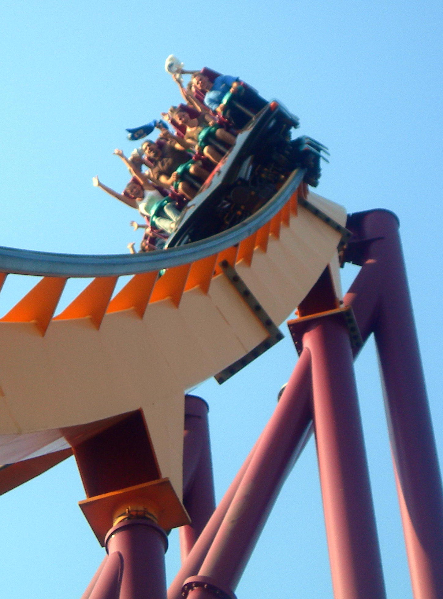 Raging Bull , montagnes russes à Six Flags Great America